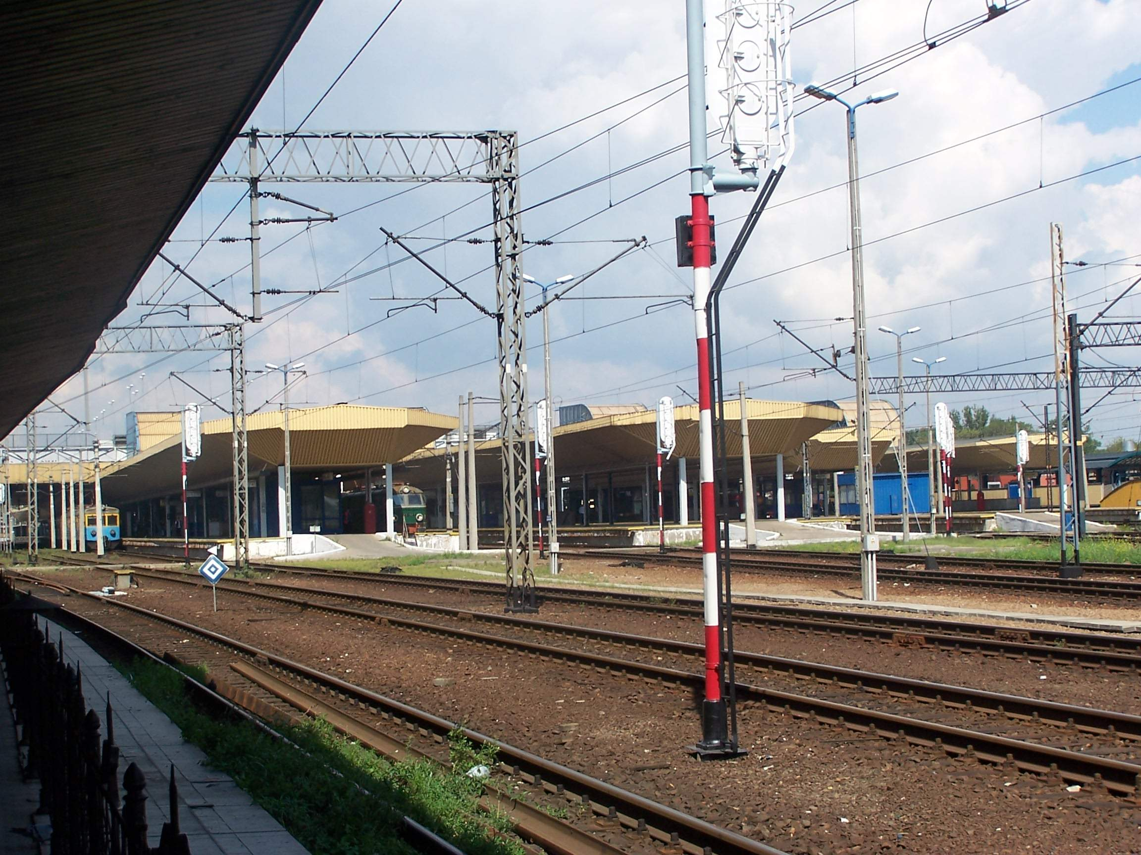 Photo by Piotrus. Main train station in Kraków (Dworzec Główny, Kraków Główny).